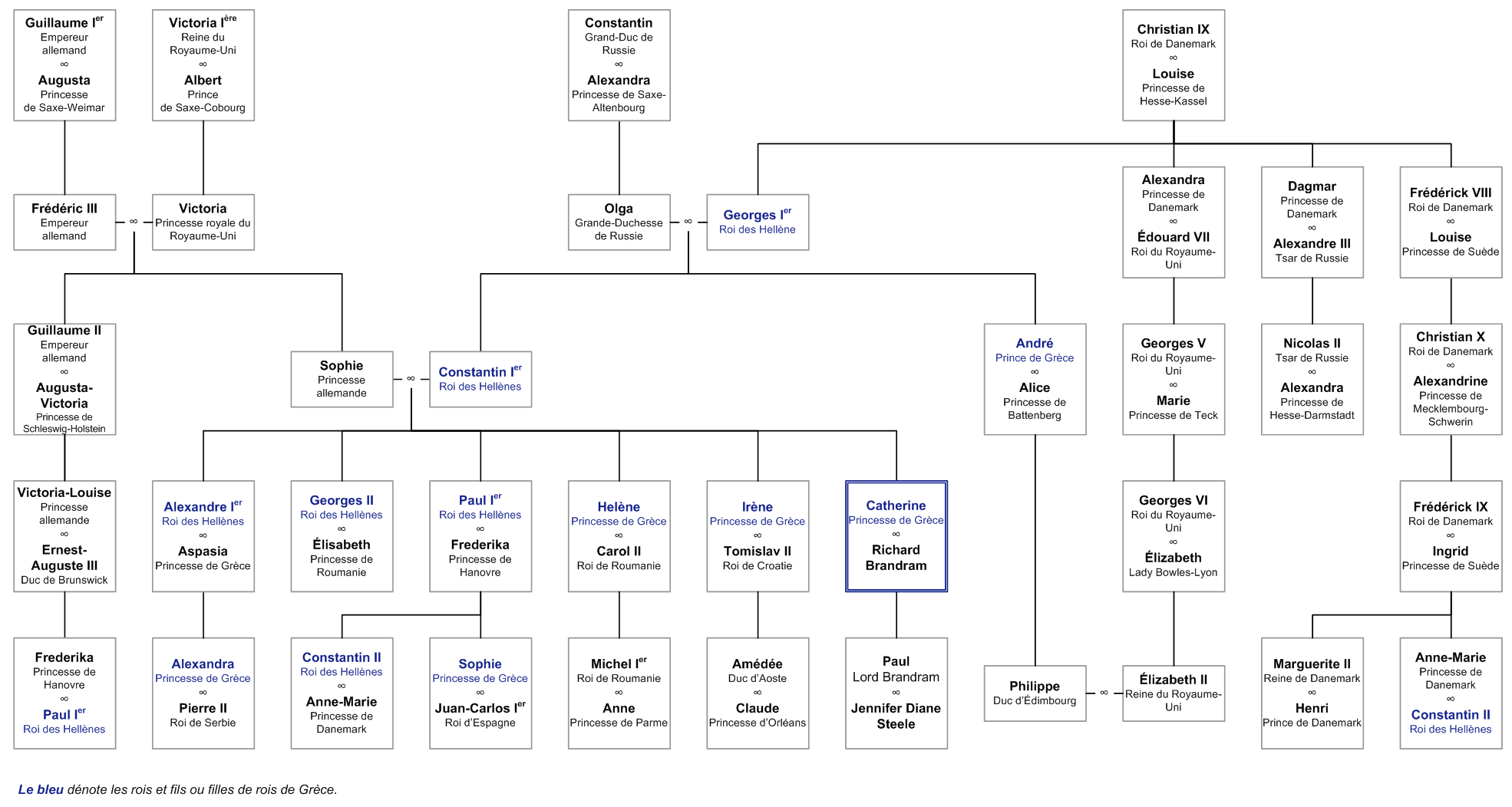 Arbre généalogique de Catherine de Grèce, pour Catherine de Grèce.